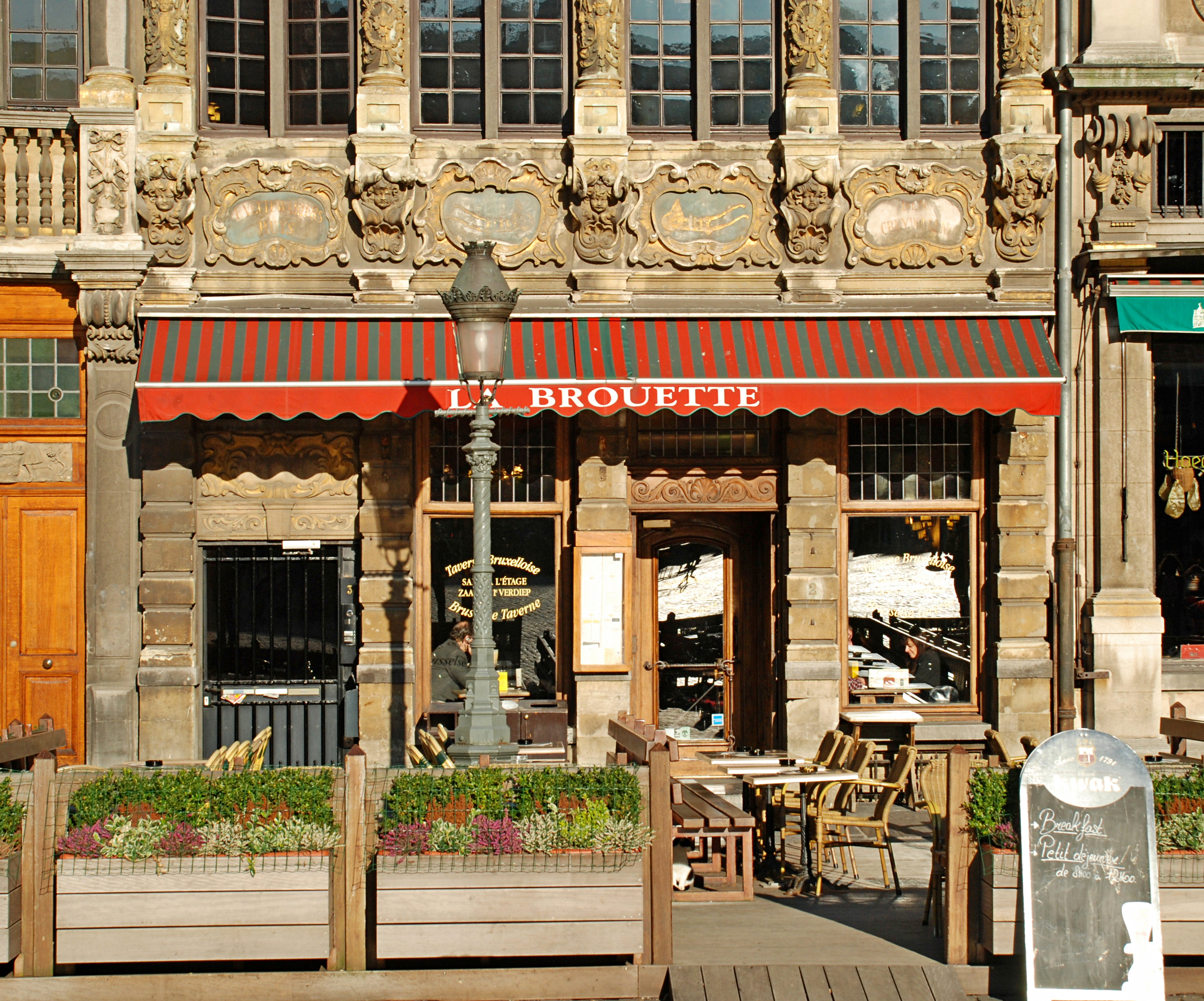 Belgique - Bruxelles - Grand-Place - Maison de la Brouette